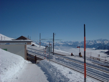 Bahnstation Kulm der Arth-Rigi-Bahn